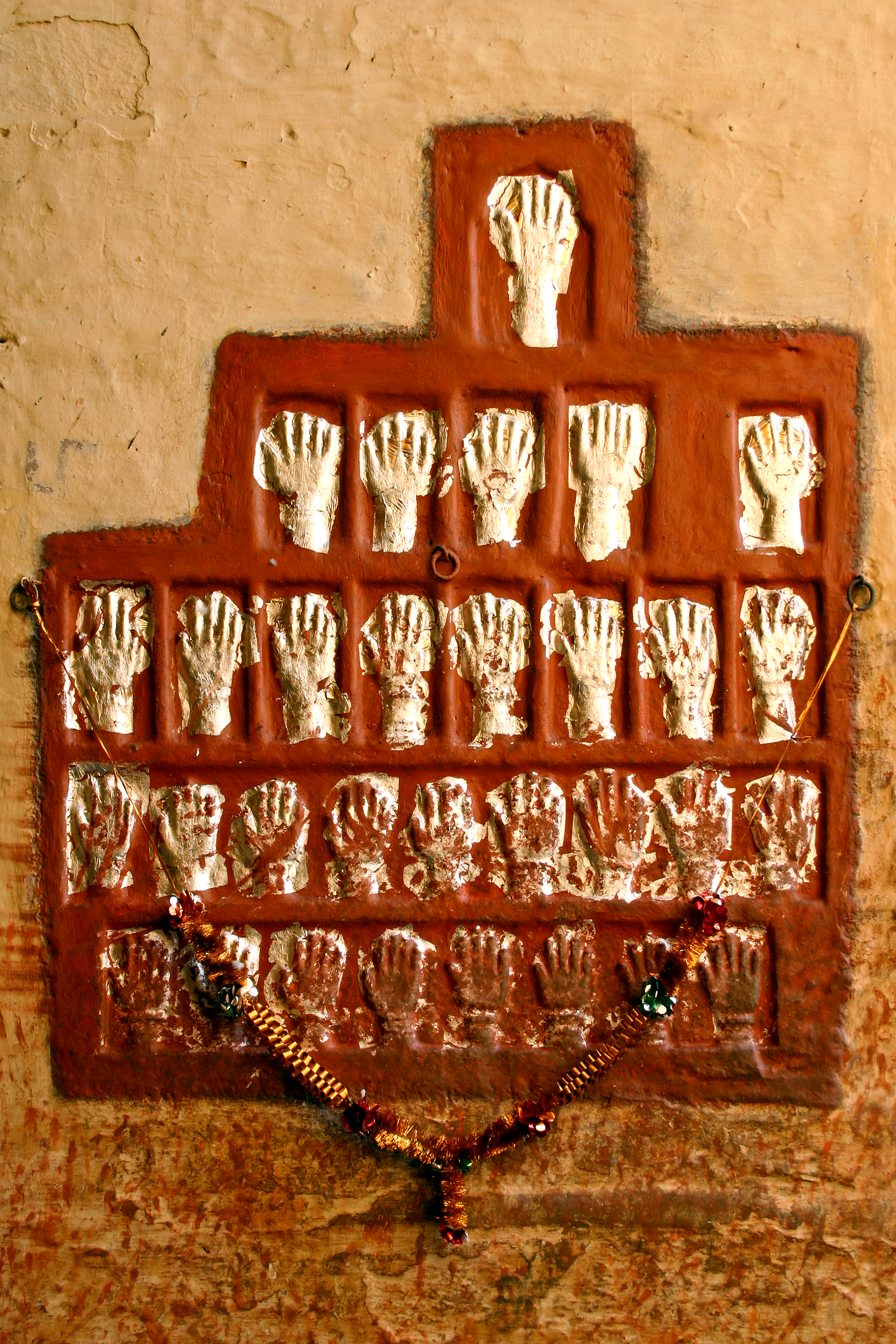 Handabdruecke der Satis im Palast von Jodhpur / Rajasthan